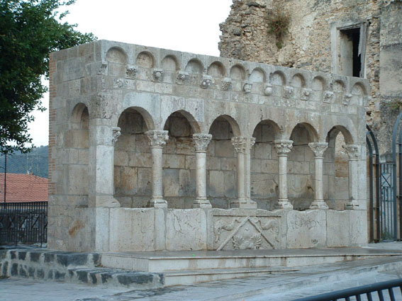 Fontana Fraterna di Isernia - Italy